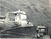 Tserkov' Sv. Davida v Tiflise (Tbilisi).